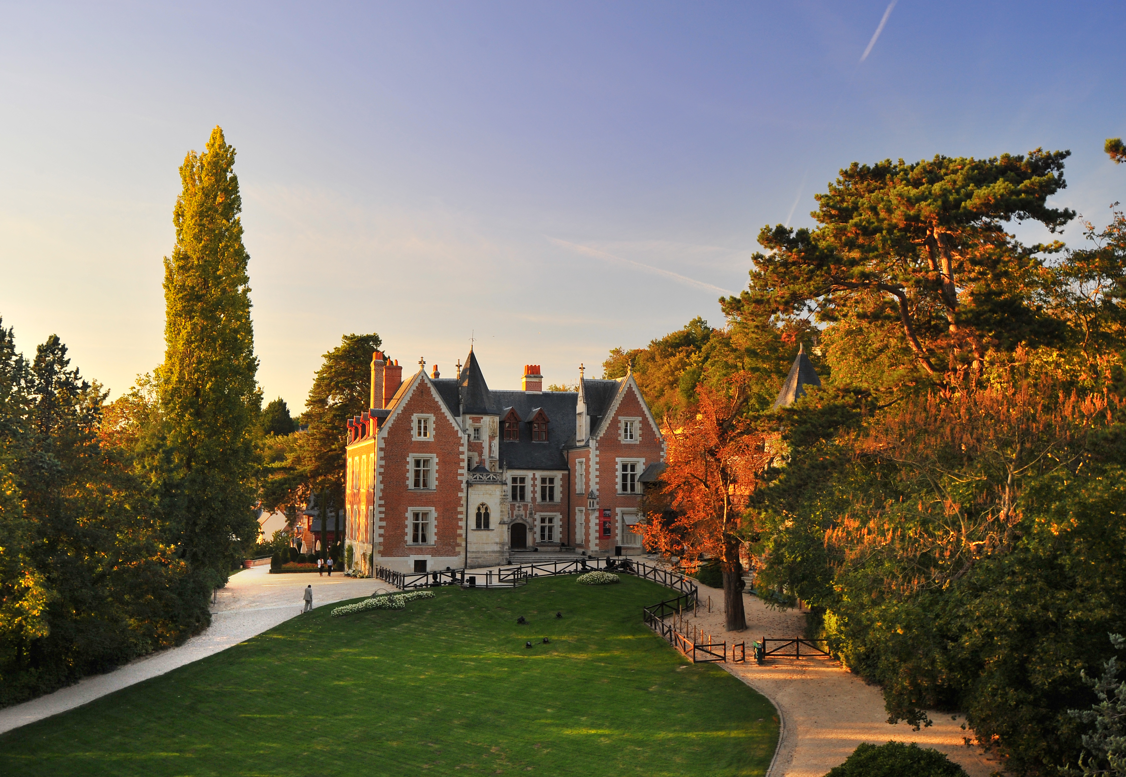 En 1516, Léonard de Vinci arrive au Clos Lucé. Il y vit et travaille jusqu'à sa mort le 2 mai 1519.